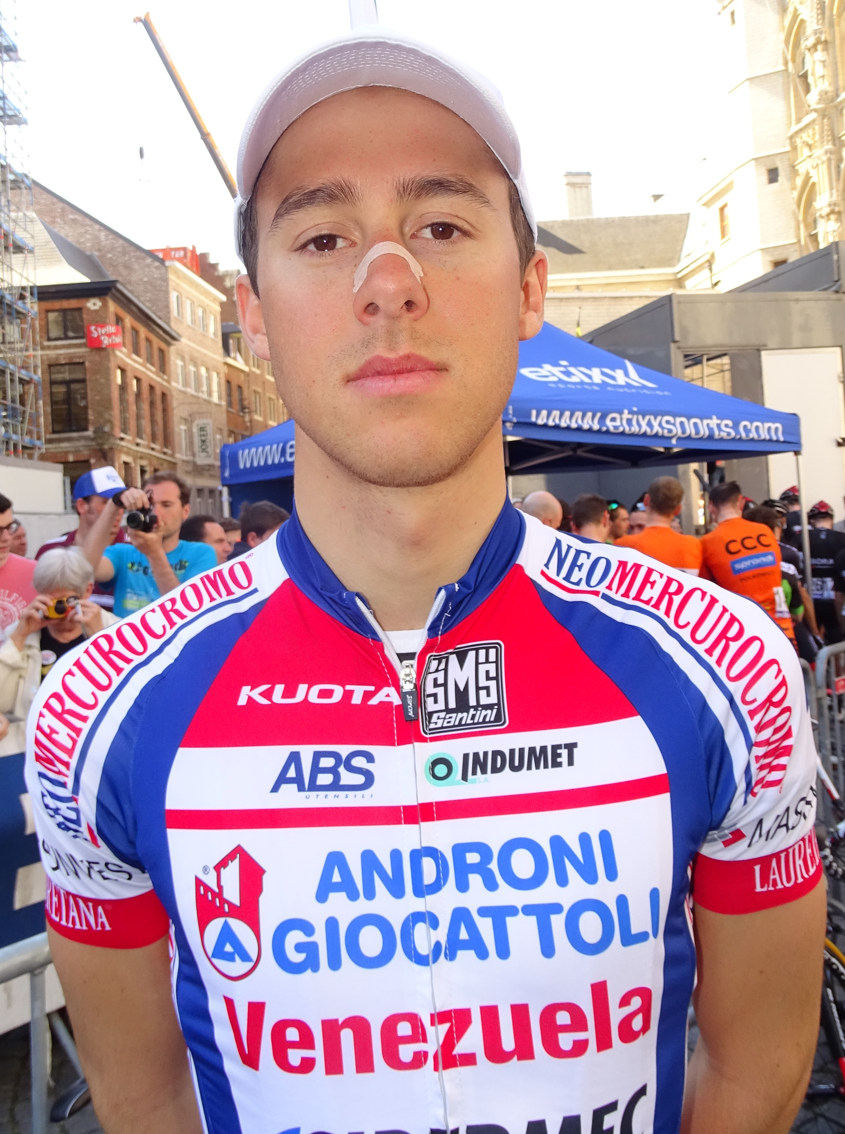 Reportage réalisé le mercredi 15 avril à l'occasion du départ de la Flèche brabançonne 2015 à Louvain, Belgique.